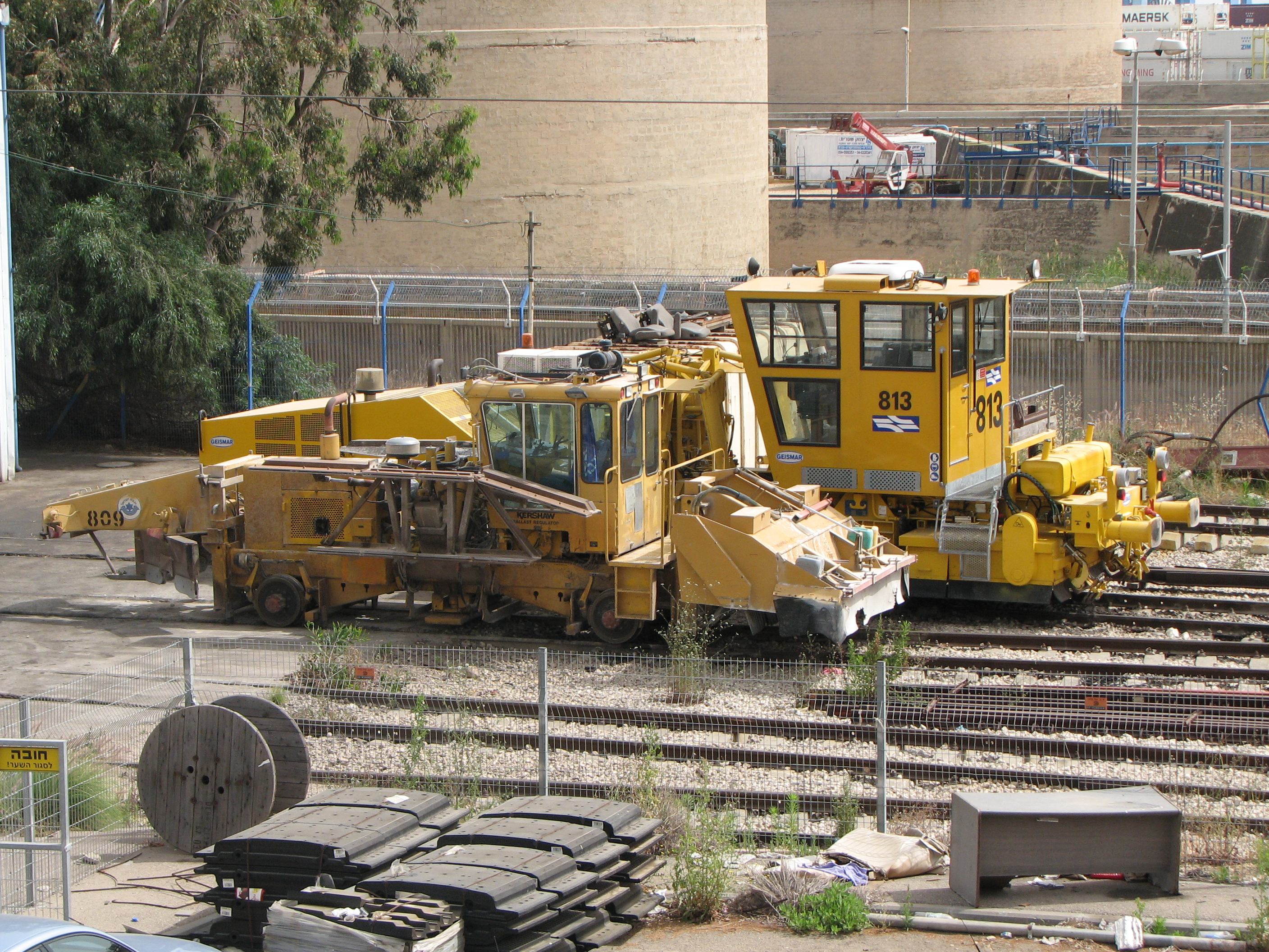 מווסתי רבד:809 מתוצרת Kershaw ו-813 מתוצרת Geismar